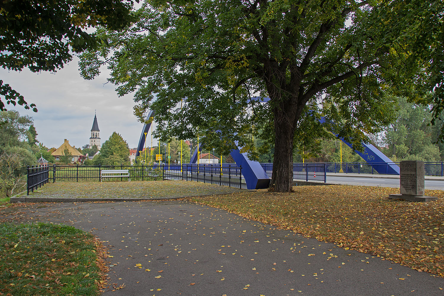 Muldebrücke Bad Düben, alter Brückenkopf der ehemaligen "Brücke des Friedens" aus dem Jahr 1959